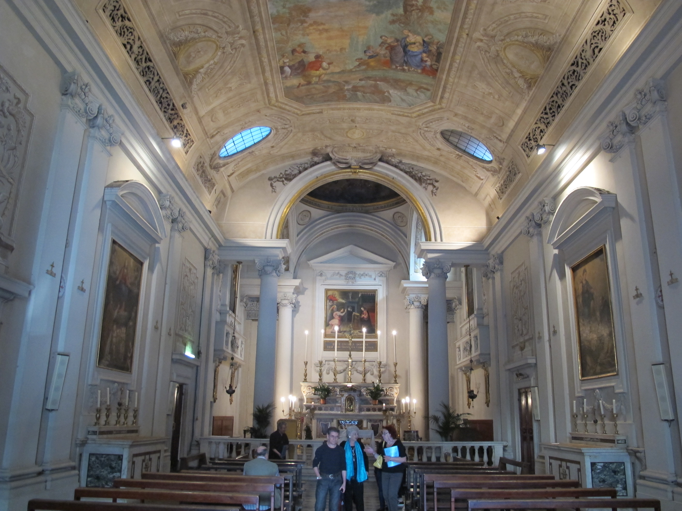 Santa maria degli innocenti, interno